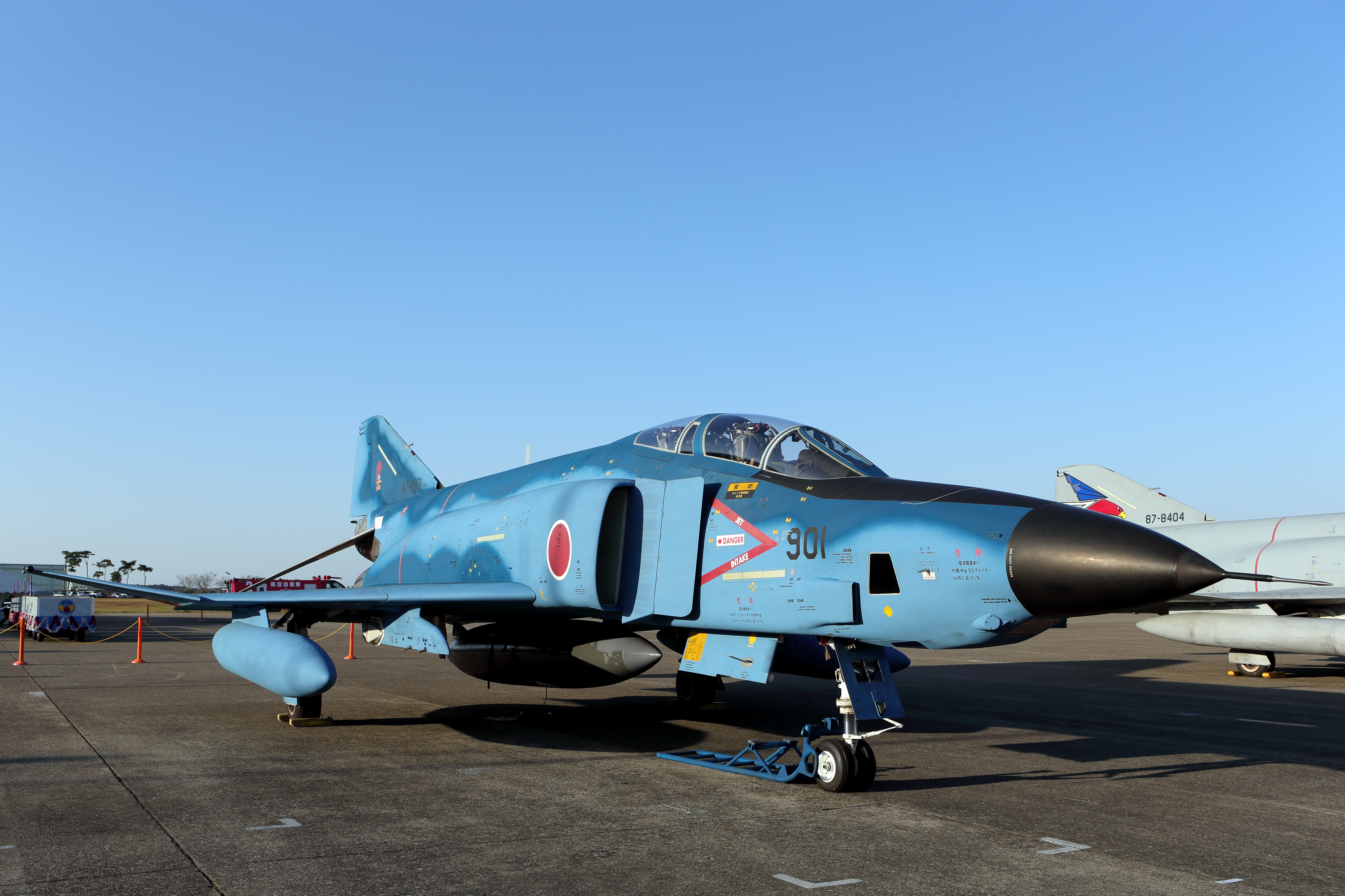 航空自衛隊百里基地 第501飛行隊の、洋上迷彩を施したRF-4E